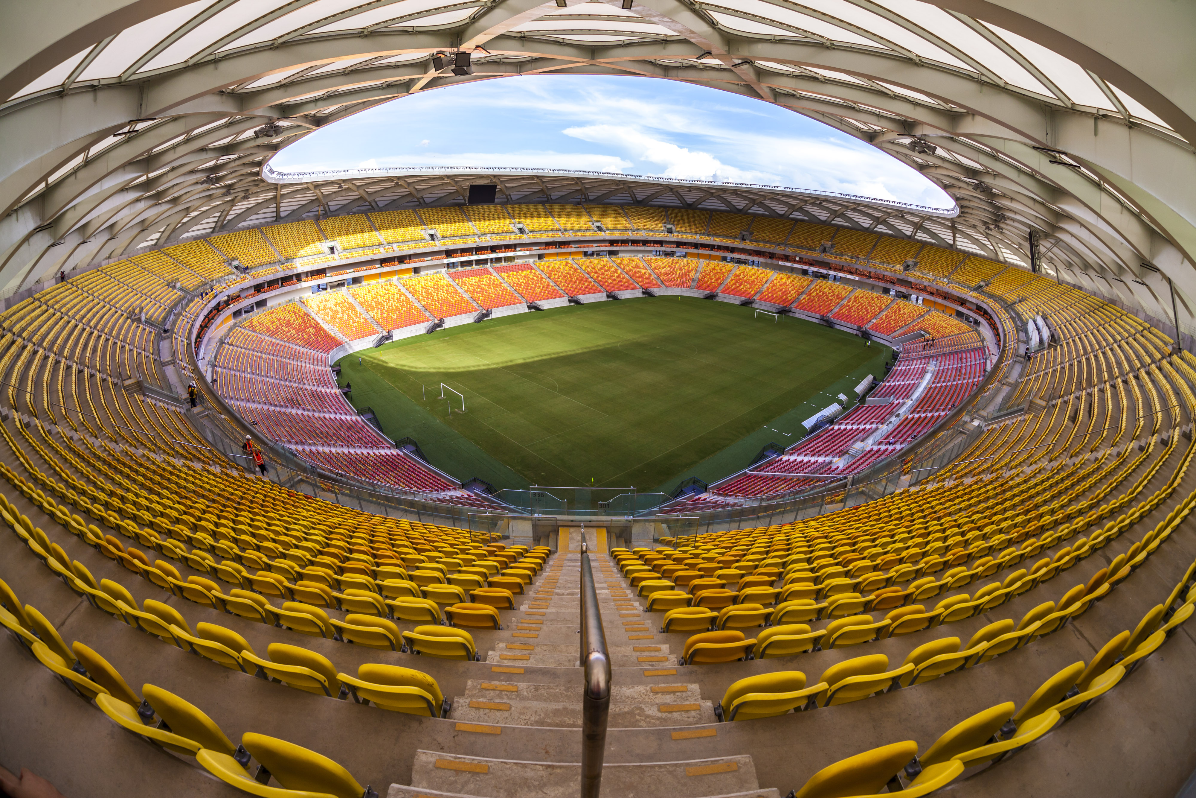 Arena da Amazônia, em Manaus, com capacidade oficial para 44 mil torcedores.